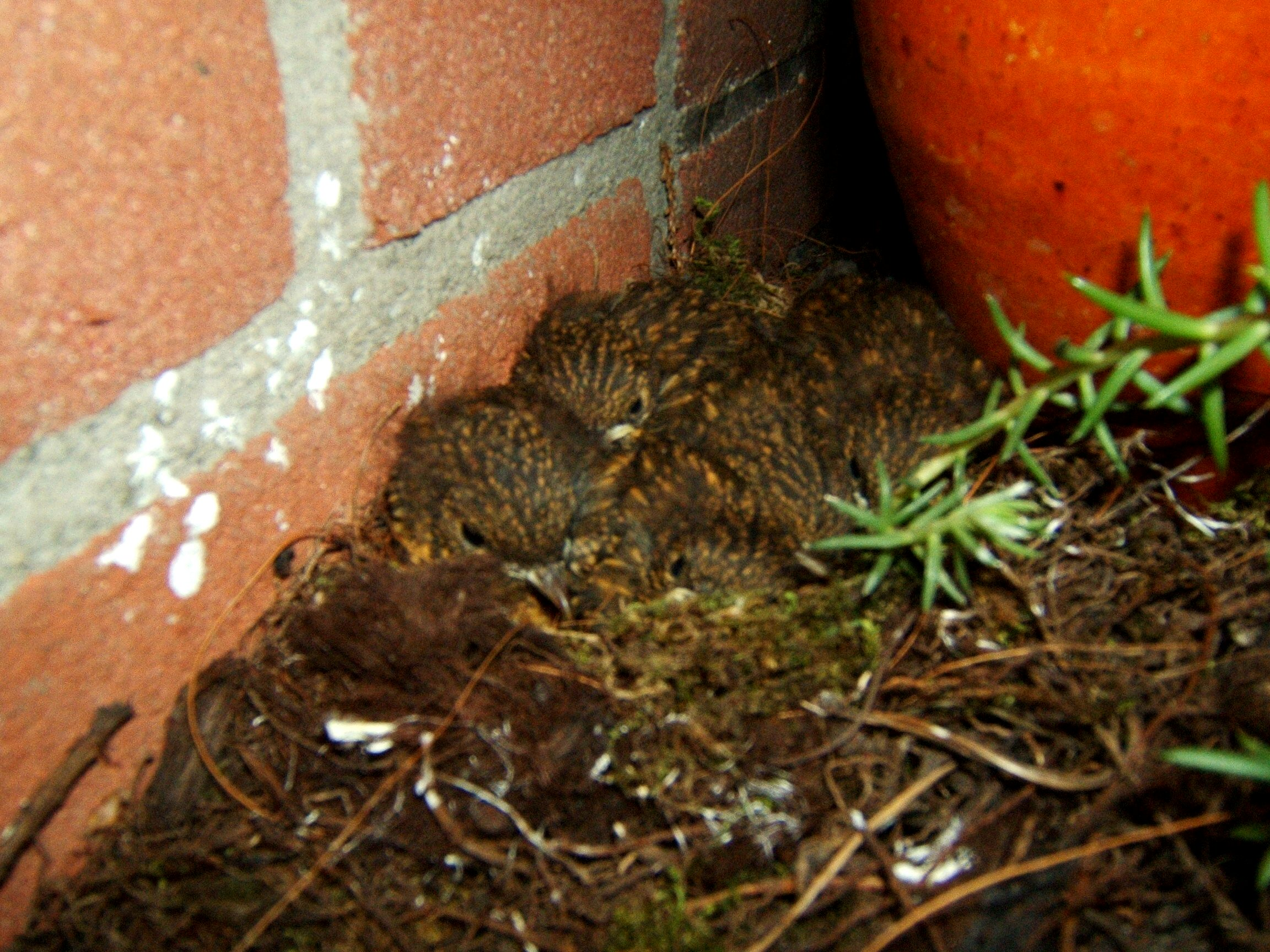 Nestje jonge roodborstjes, gefotografeerd op 25 juni 2005 's avonds om ca. 22.00uur (richten op de goed geluk)